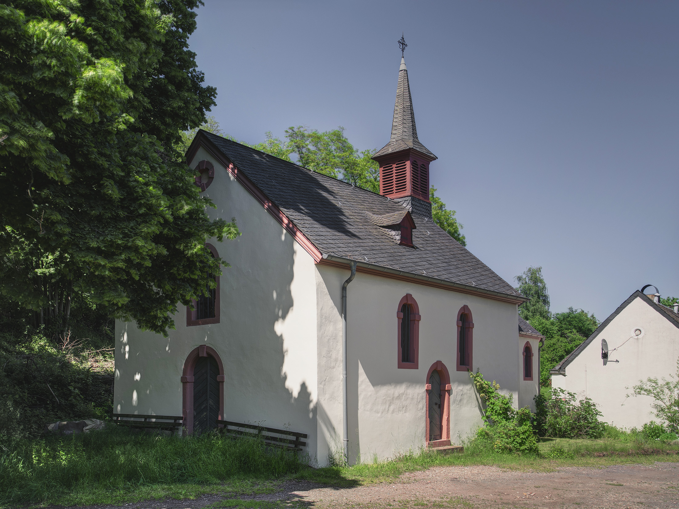 Kapelle St. Jost, Trier, erbaut 1706. Gelegen an der Biewerer Straße, südwestlich außerhalb des Trierer Ortsteils Biewer.